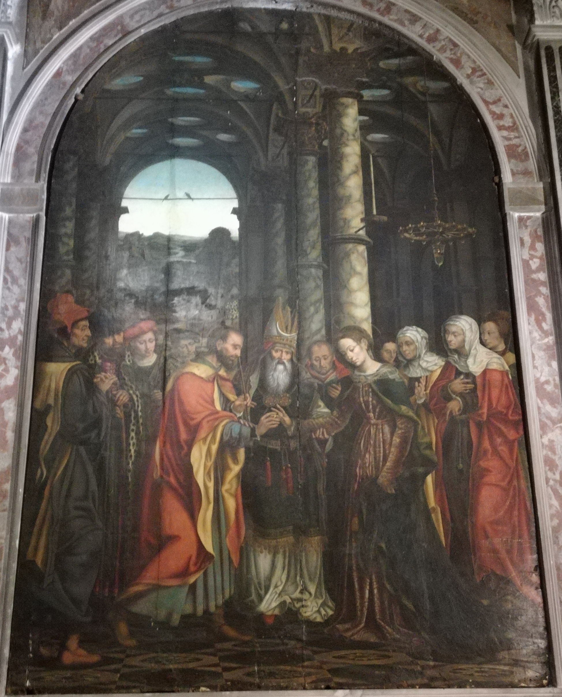 Nostra Signora del Monte (Genova), Sposalizio di Maria di Simone Dondo da Carnoli